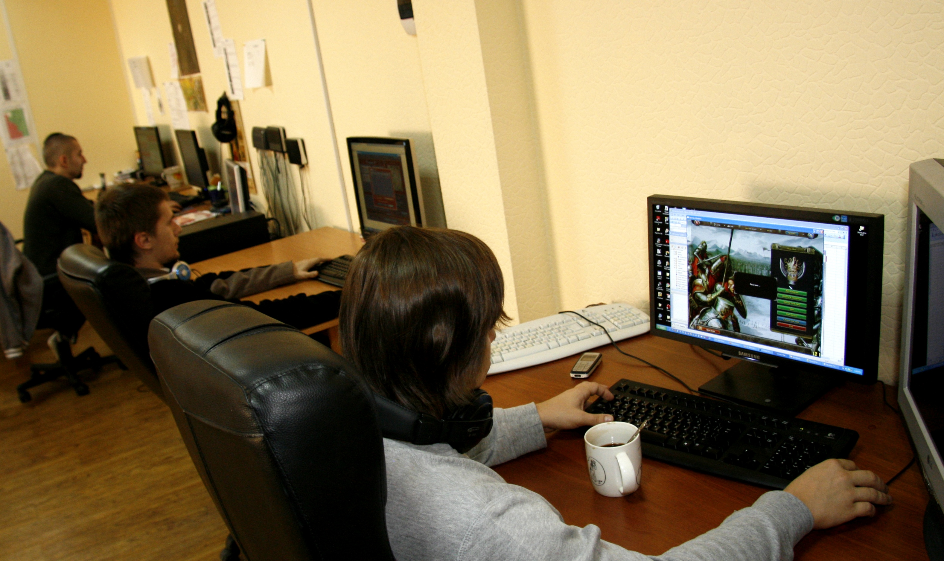 Photo prise dans le studio de Frogwares à Kiev.